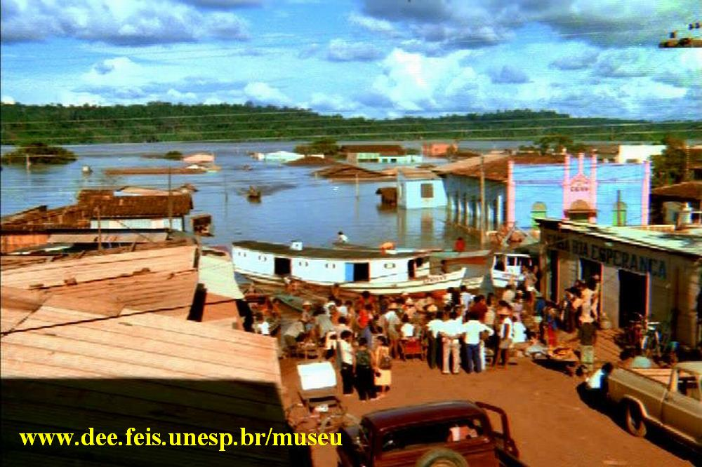 Tucuruí - Histórica